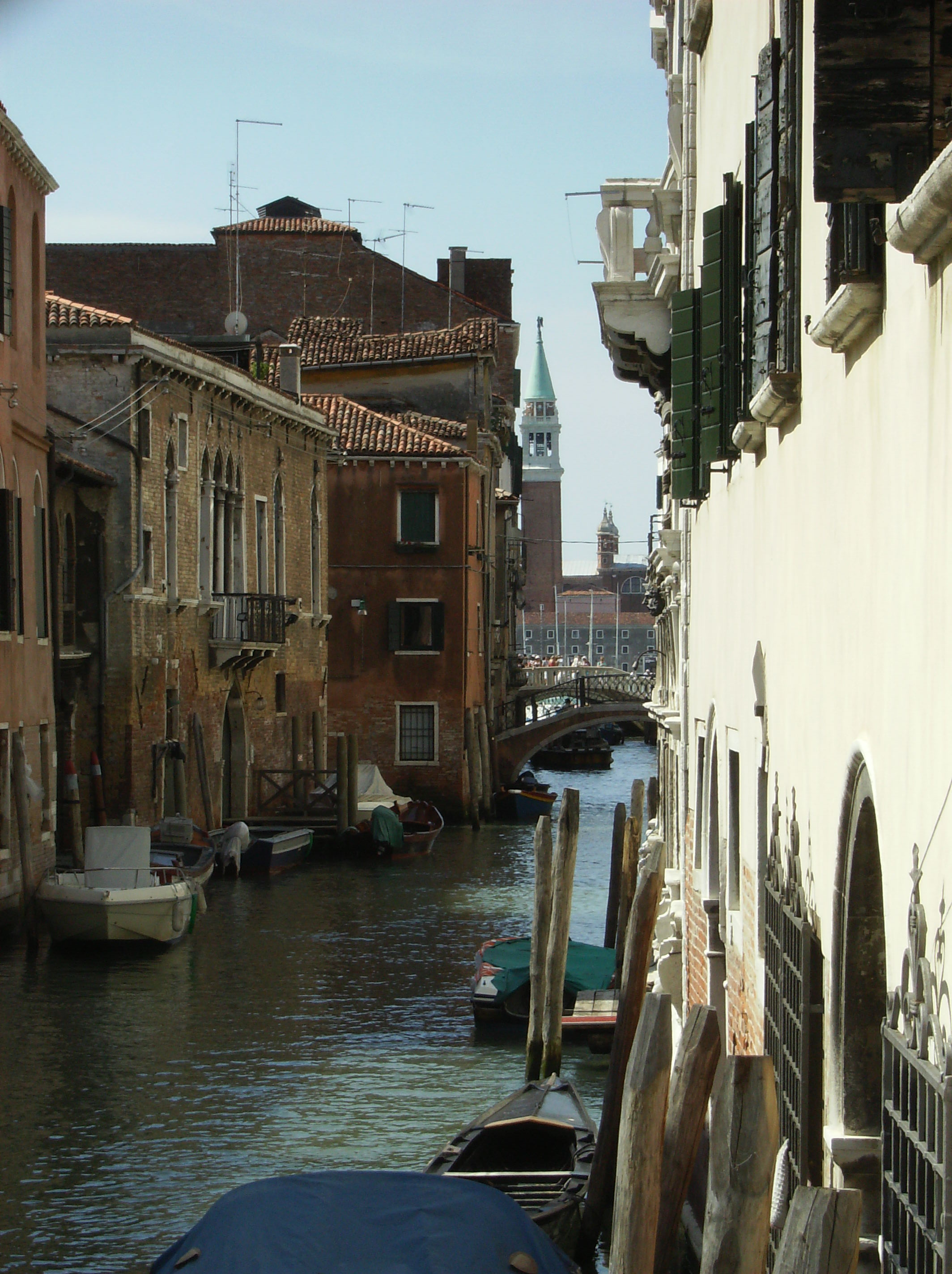 rio della pieta